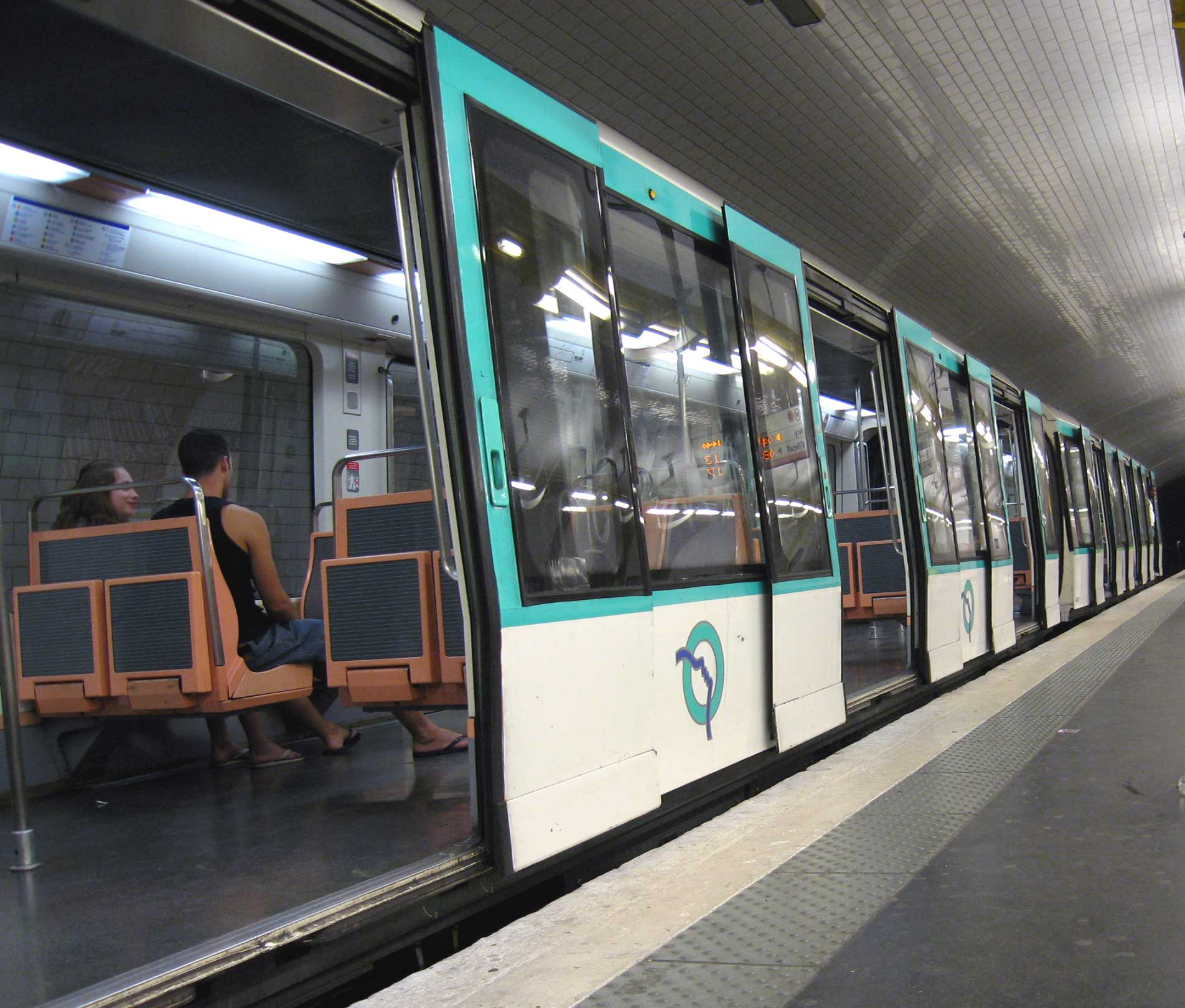 Rame MF88 portes ouvertes à la station Louis Blanc, Paris, France